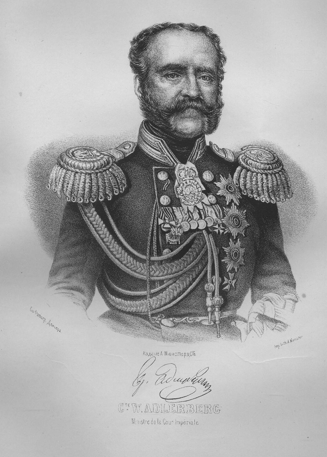 Лит. А. Мюнстера, СПБ. Imp. Lith. A. Munster (Editeur)